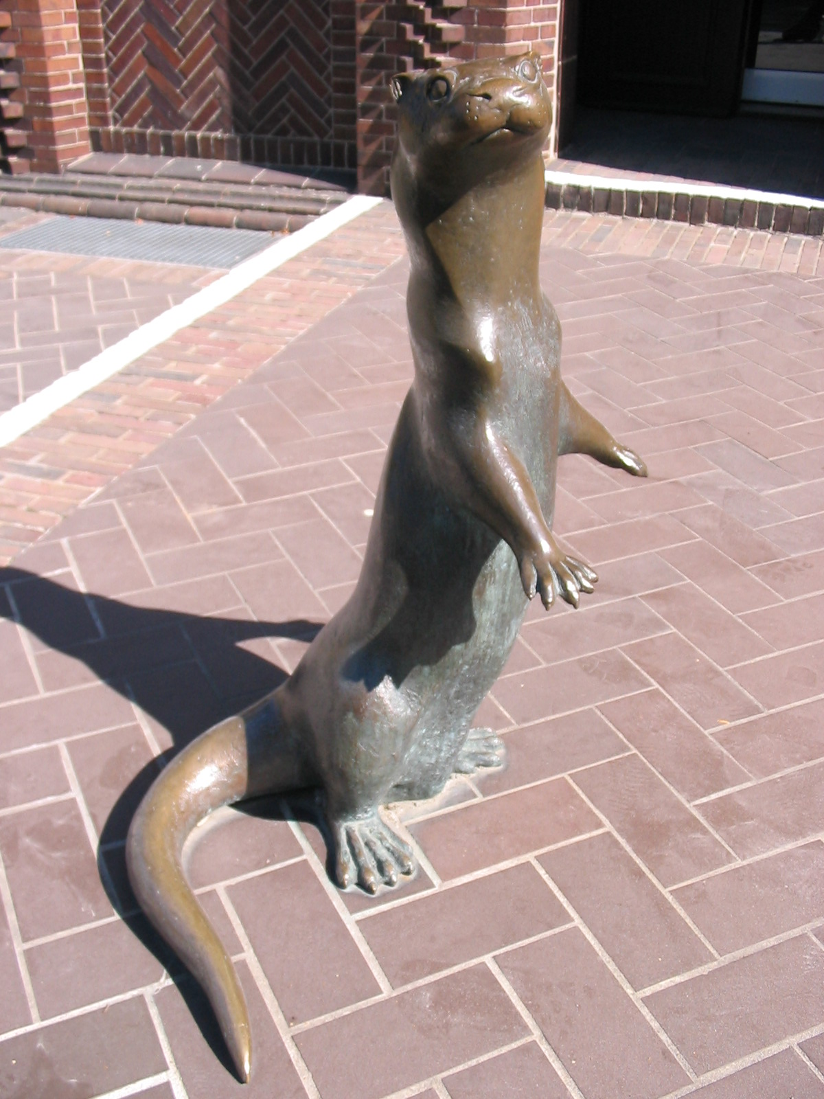 Braunschweig: Fischotter-Skulptur von Hans Joachim Ihle vor dem Naturhistorischen Museum